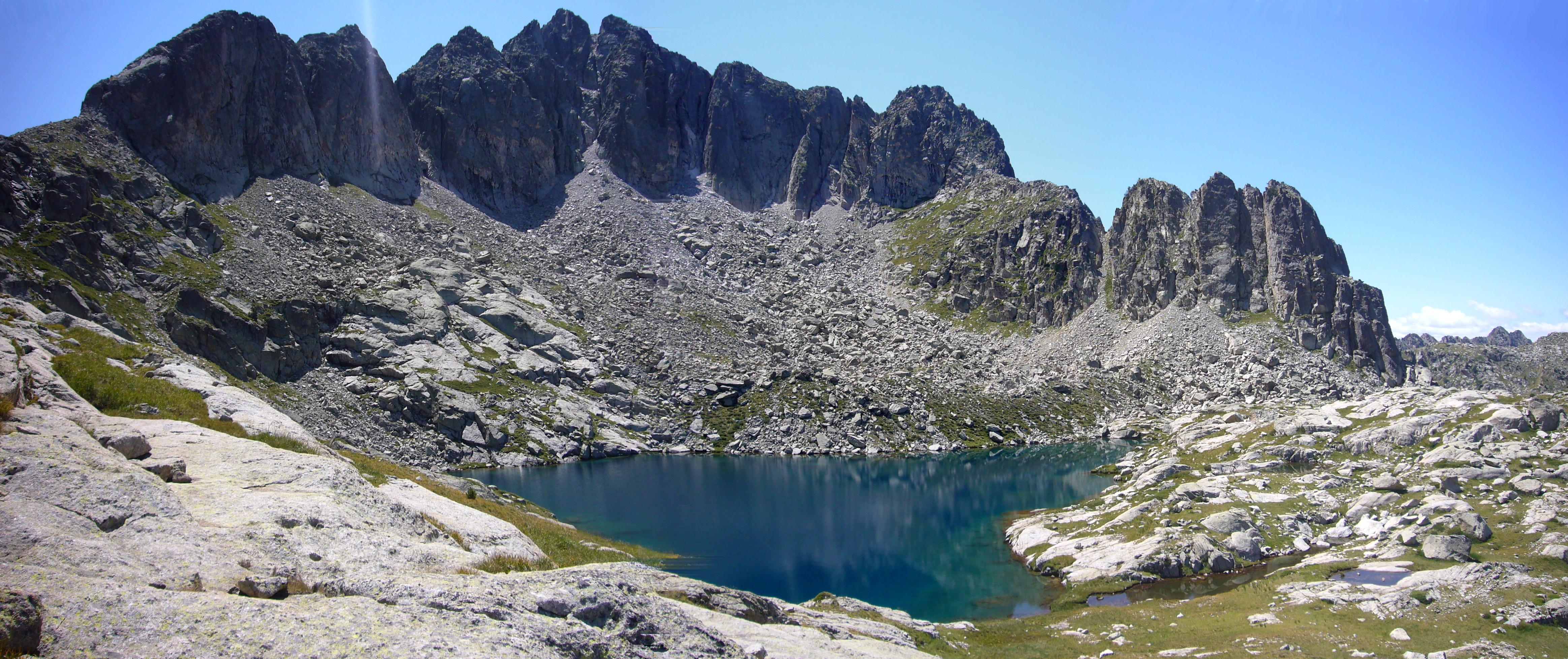 Estany Perdut i Tossal de la Montanyeta; la Vall de Boí, Alta Ribagorça, Catalunya